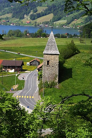 Morgartenturm (Nr. 03.1-4537)